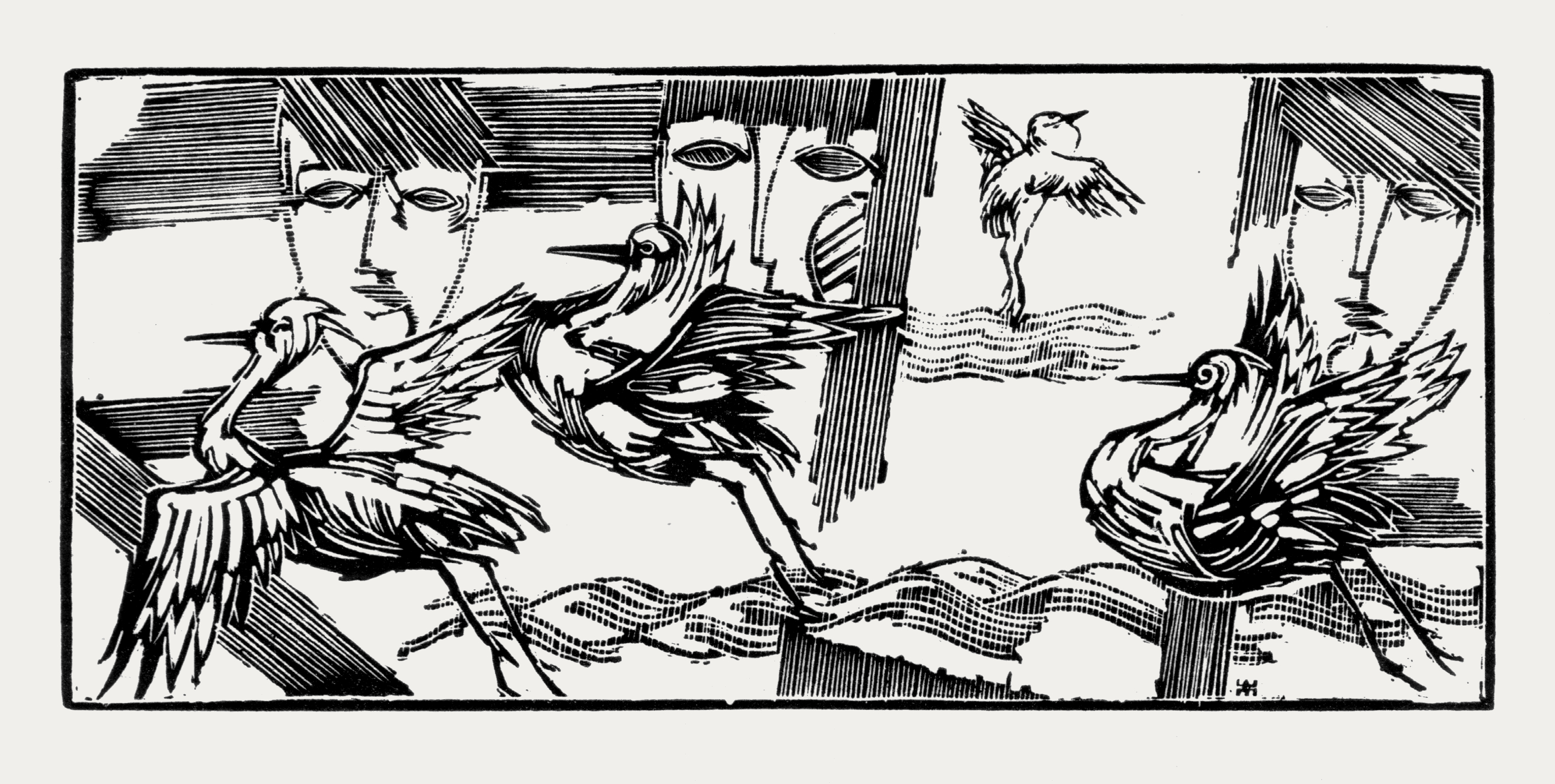 копия гравюры Morihite (Alexej M. Schultz) «Op.7 Mari Koide». 1990